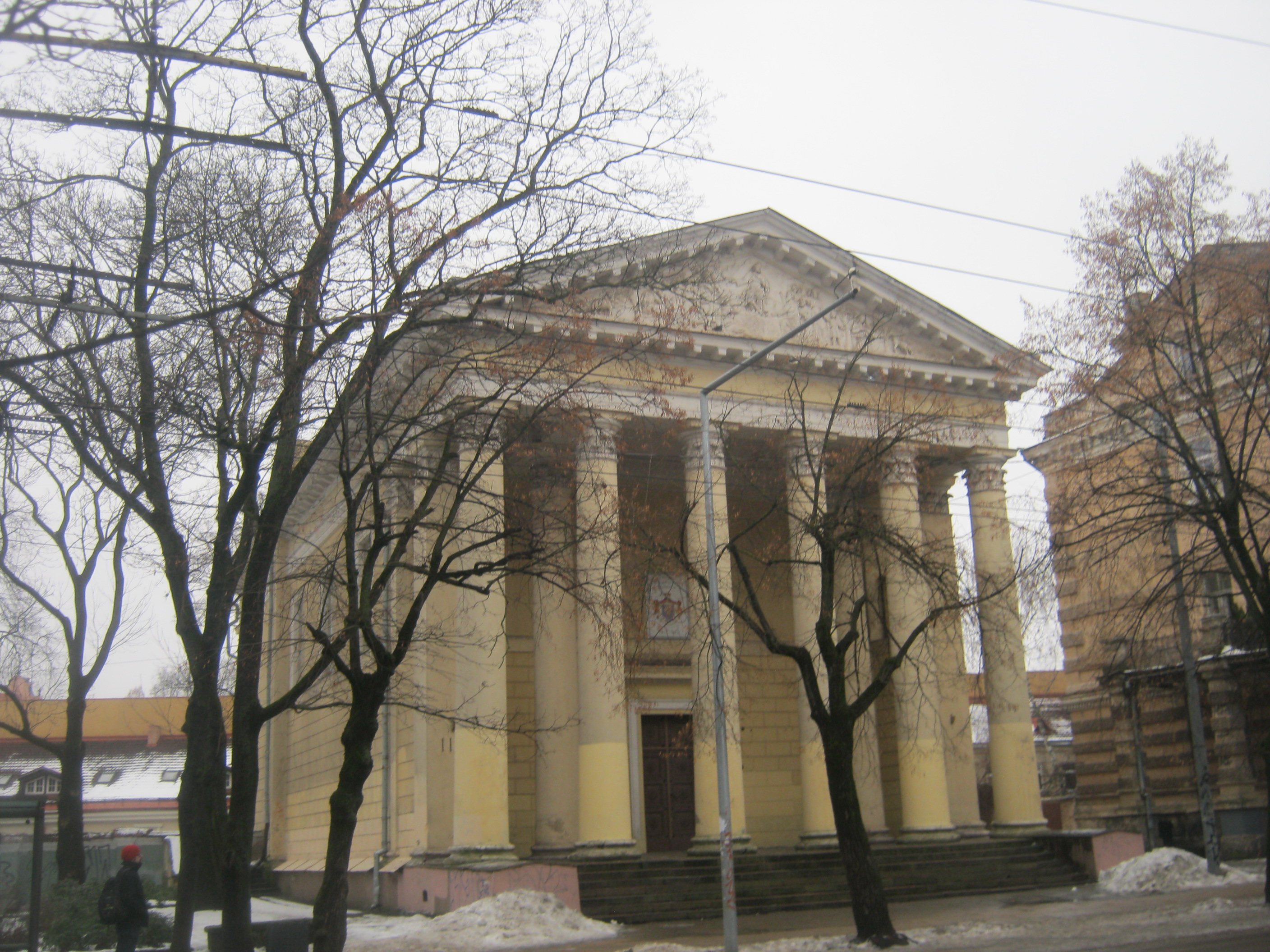 Vilniaus evangelikų reformatų bažnyčia